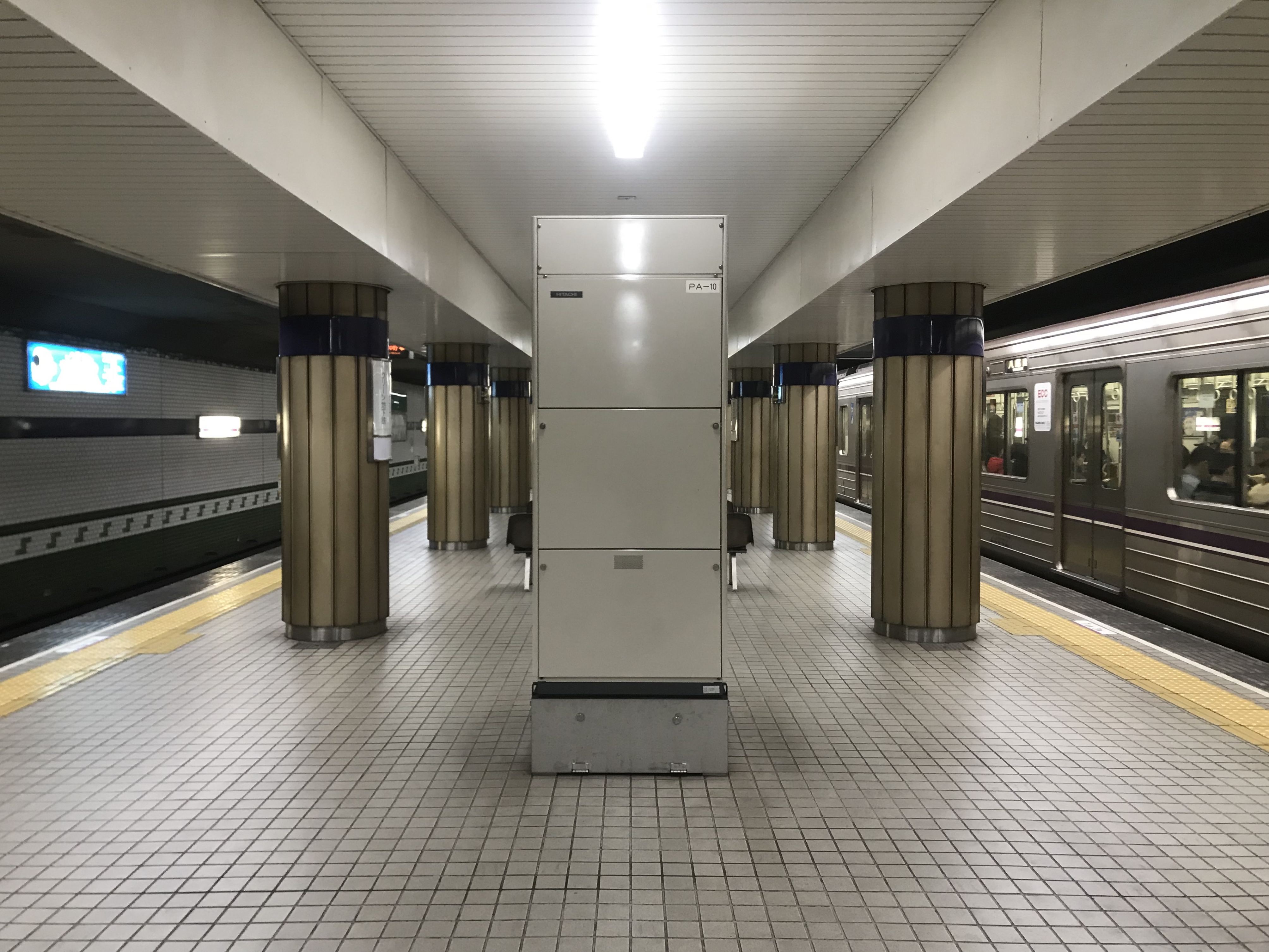 田辺駅のホーム(奥は文の里方面)